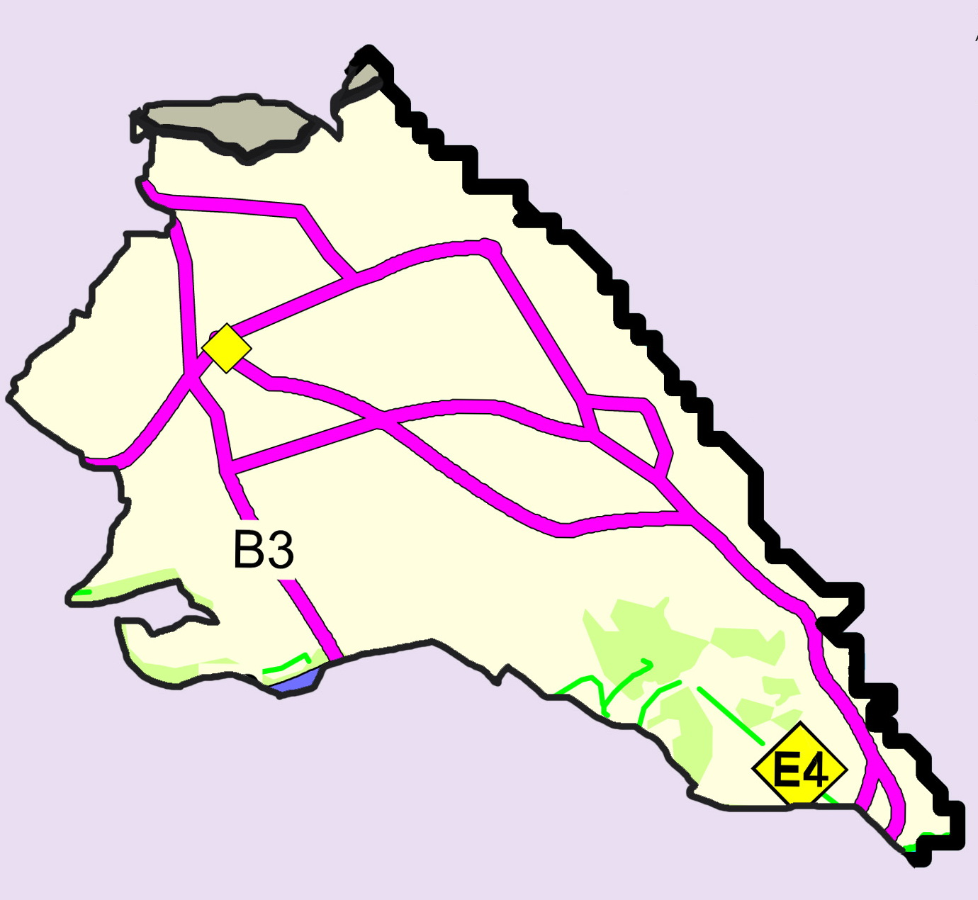 Συνοπτική παρουσίαση του Παραλιμνίου